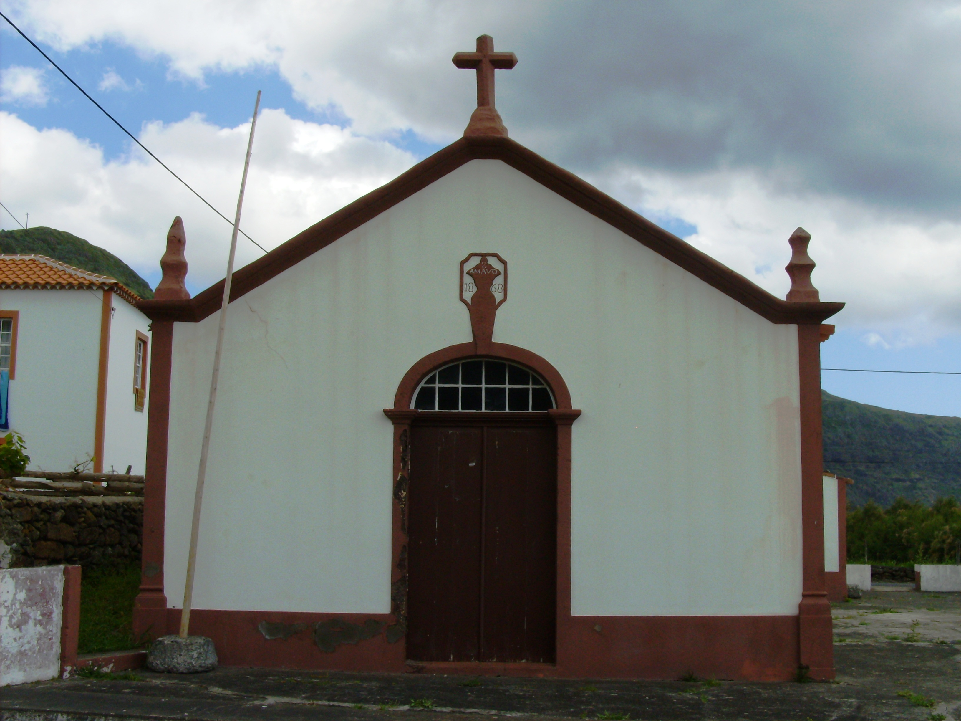 Ermida de Nossa Senhora dos Remédios (Ermida de Santo Amaro), Praia Formosa, freguesia da Almagreira, concelho de Vila do Porto, ilha de Santa Maria (Açores), Portugal.